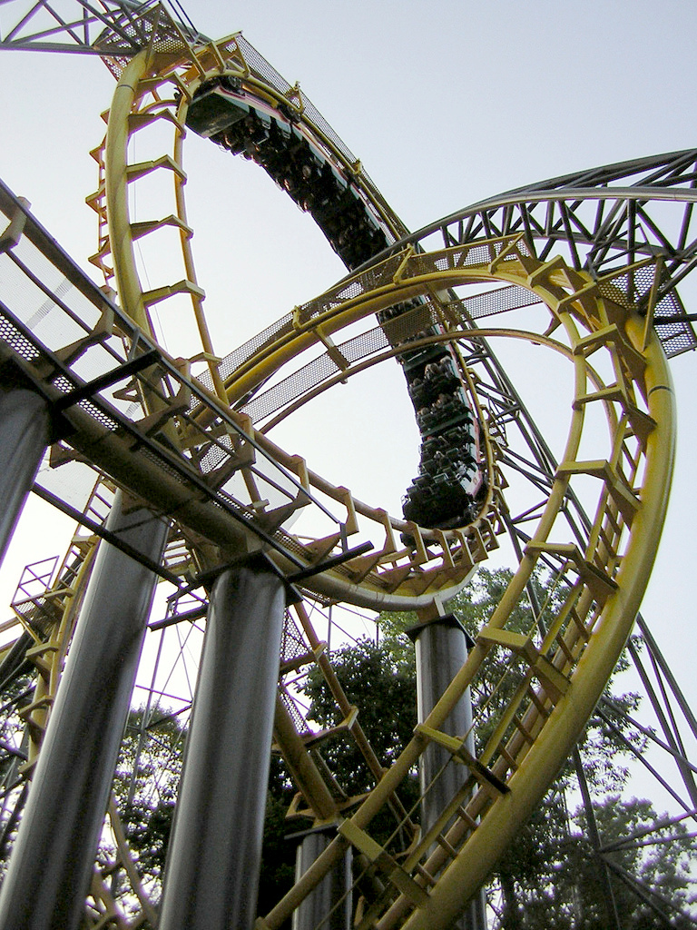 Loch Ness Monster roller coaster at Busch Gardens Europe.